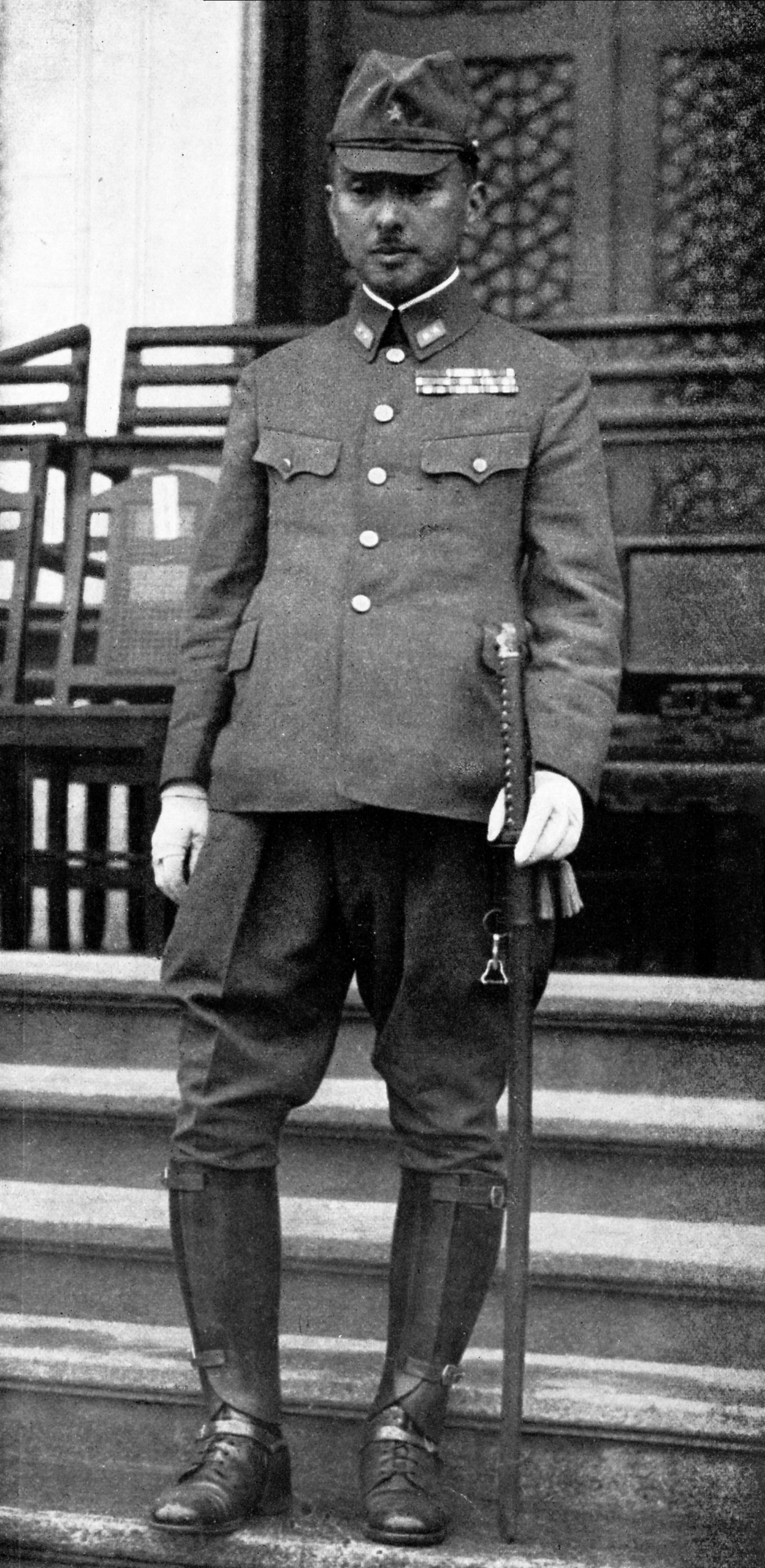 朝香宮鳩彦王 or Prince Asaka (Yasuhiko)